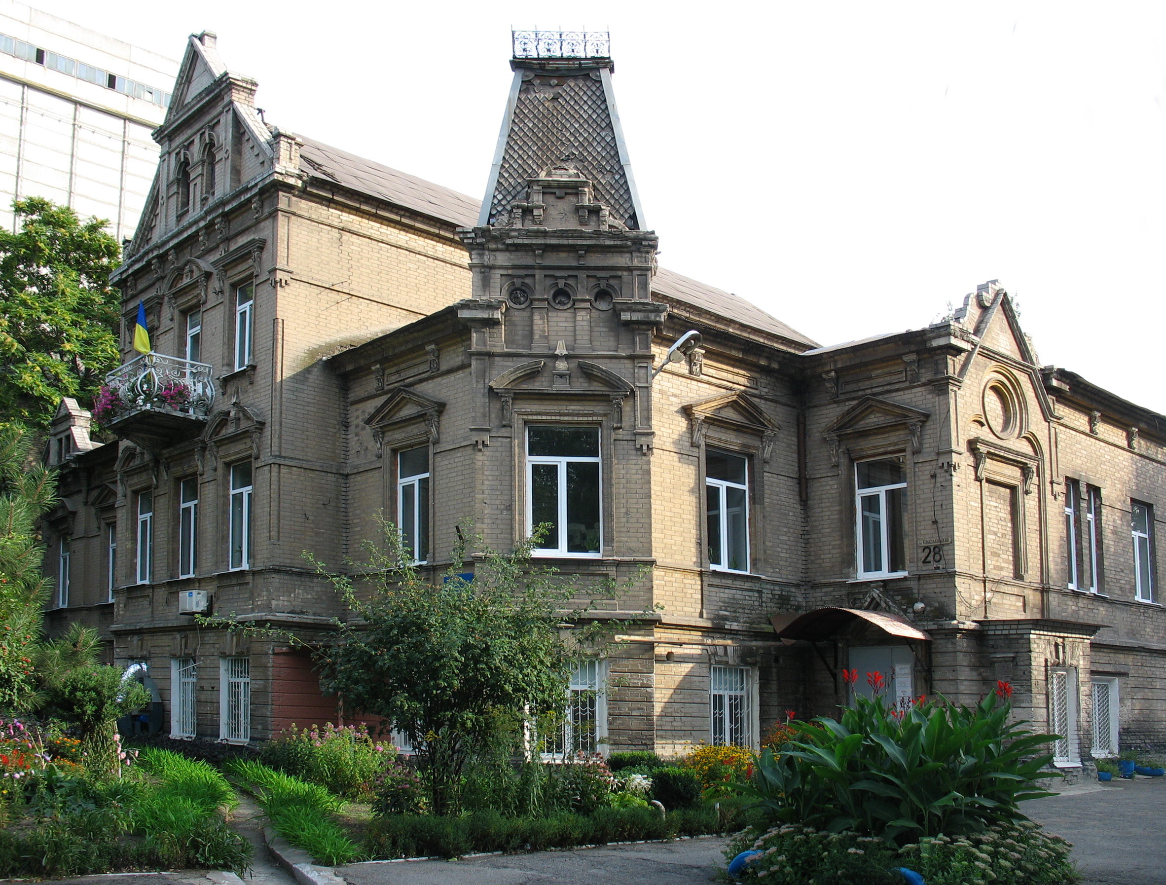 Житловий будинок Коппа, Запоріжжя, вул. Комсомольська, 28